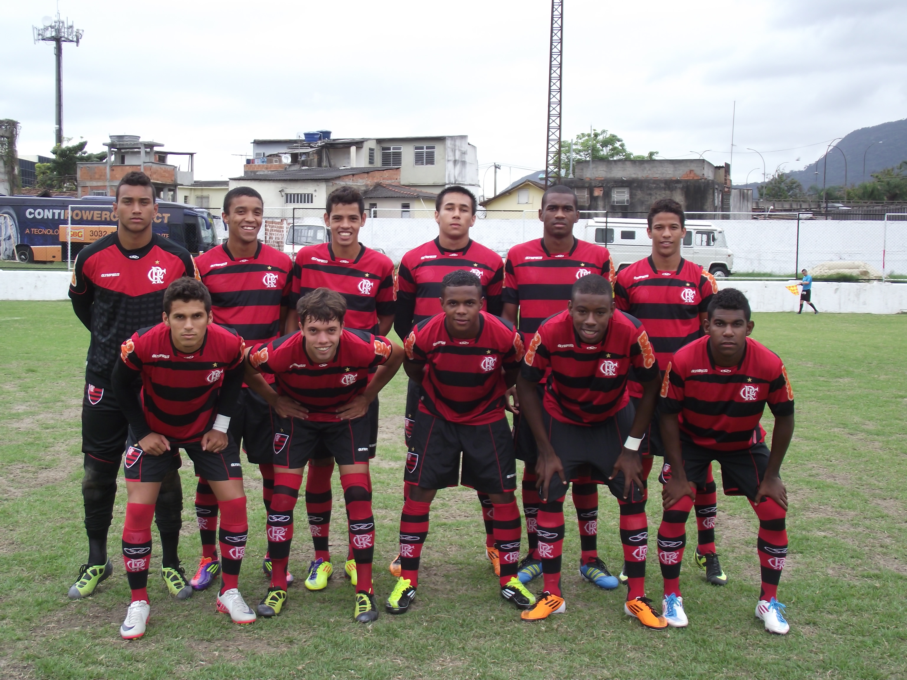 Equipe de juniores do Flamengo em 2011.